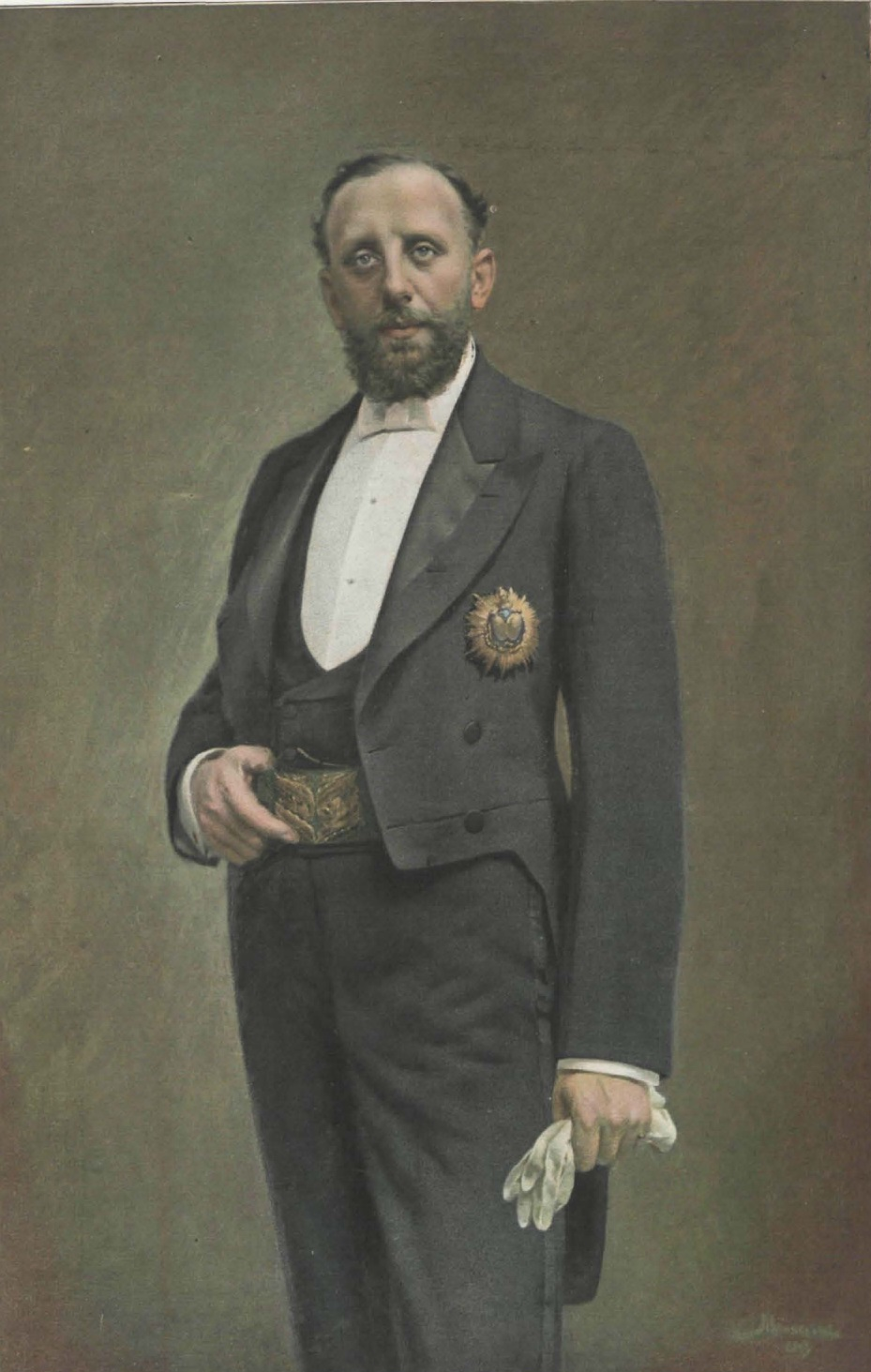 Carlos González Rothwos, Gobernador civil de Barcelona